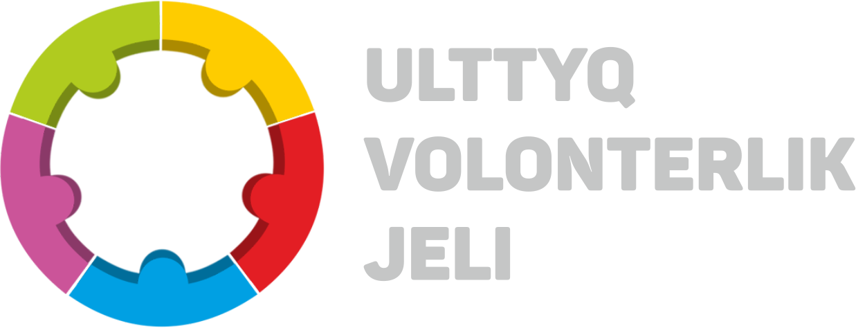 Логотип Национальной волонтерской сети Казахстана на казахском